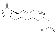 Формула жироной кислоты